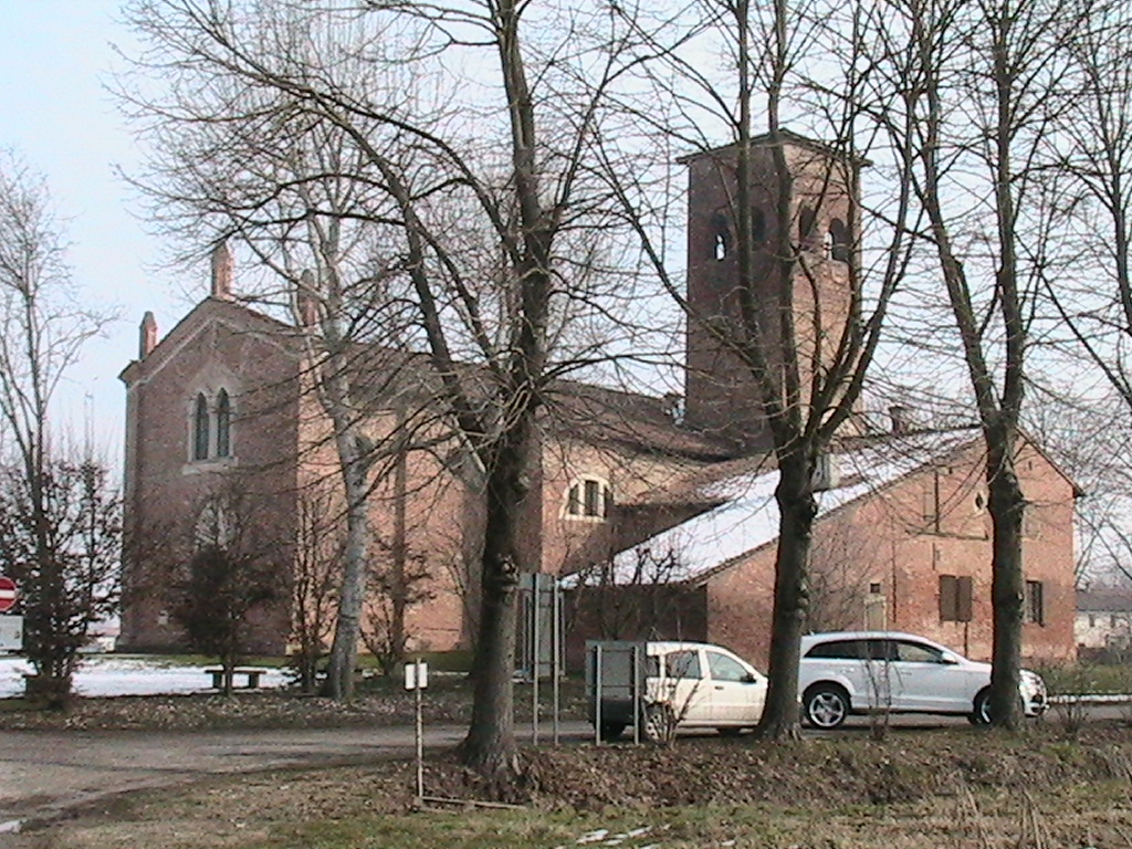 Scandolara Ravara - La Chiesa Vecchia